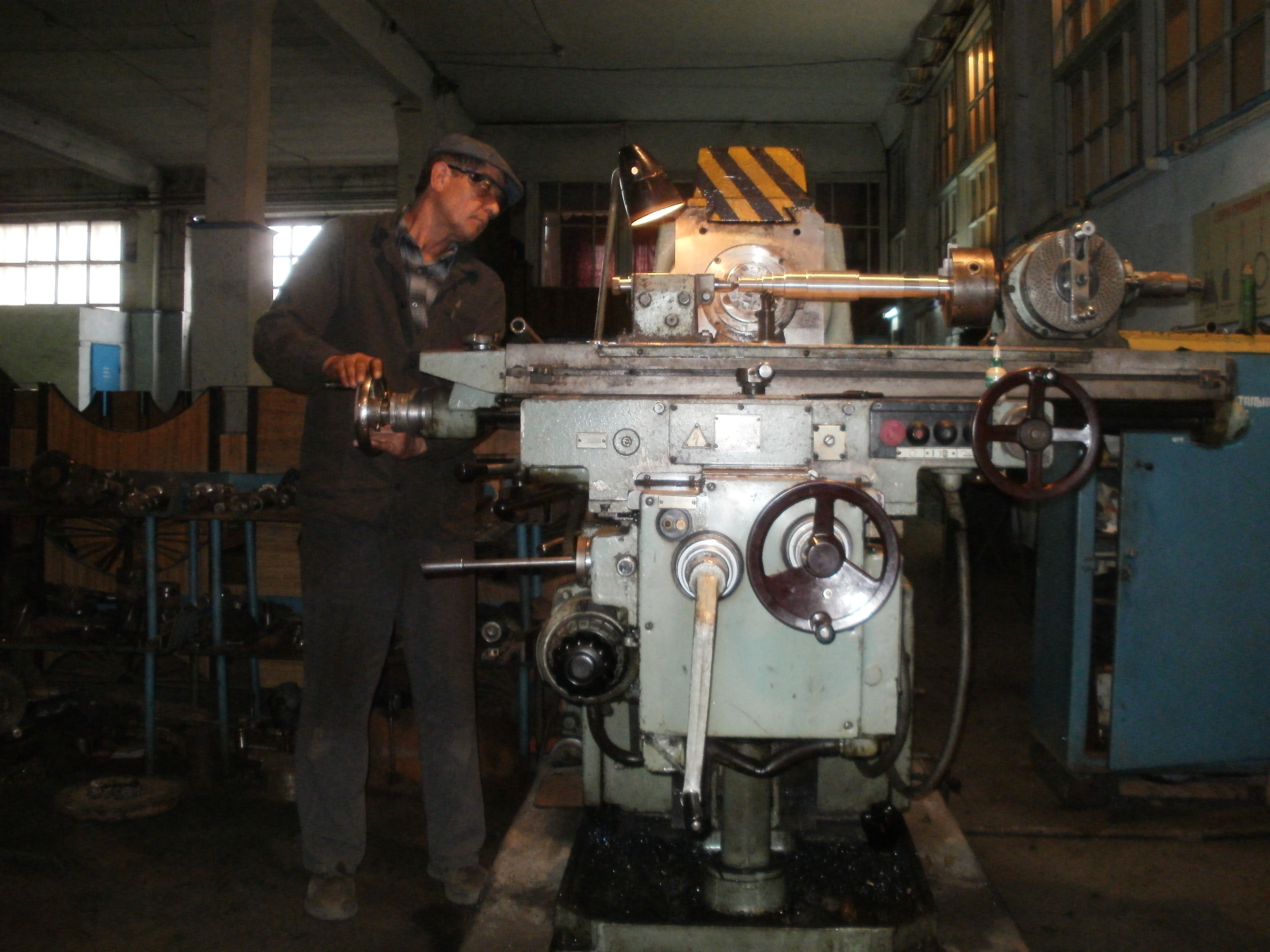 Специалист по работе на фрезерном станке